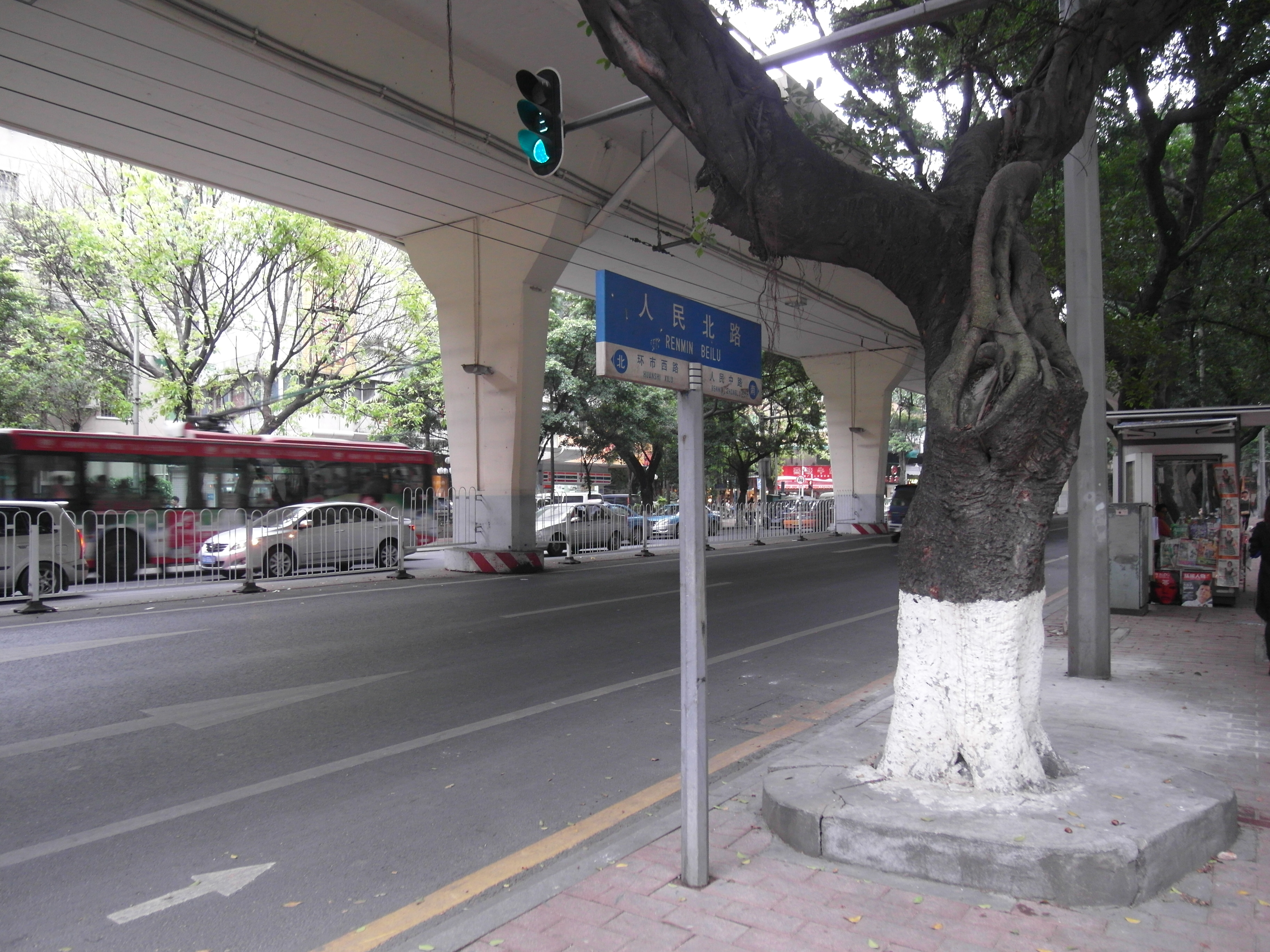 中文（香港）: 廣州市人民北路